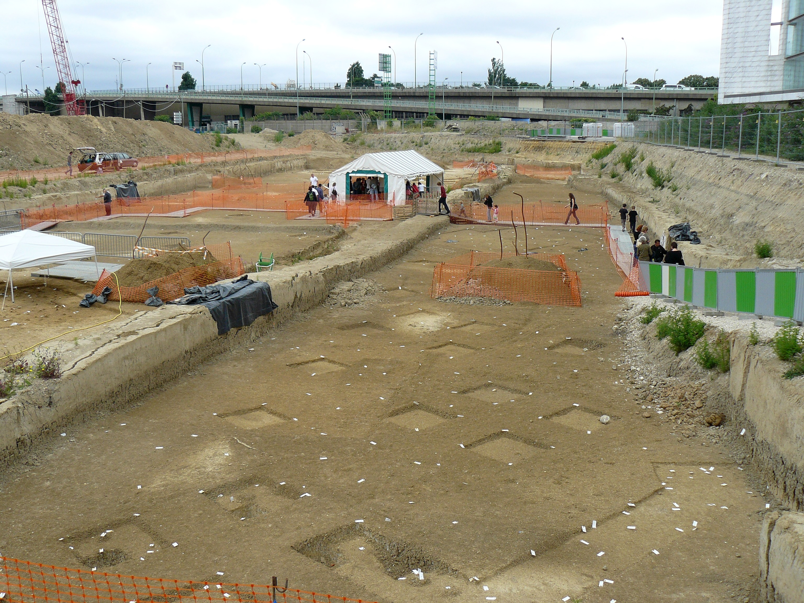 Chantier de fouilles de l'INRAP (fév-jul.2008) : vestiges de chasseurs-cueilleurs du mésolithique à Paris XVe, 62 rue Henri-Farman, sur le futur emplacement du SYCTOM.